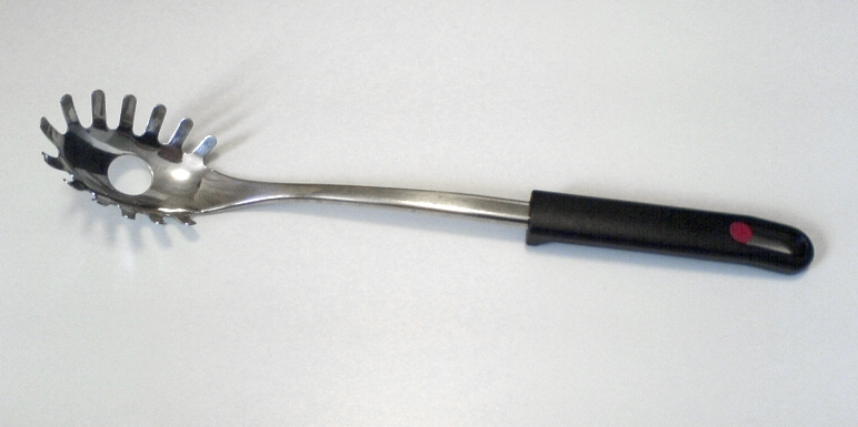 Bildbeschreibung: Bild zeigt einen Spaghettiheber Quelle: selbst fotografiert Fotograf/Zeichner: Timus Datum: 17. Juli 2006 Sonstiges: lizenzfrei, da selbst fotografiert